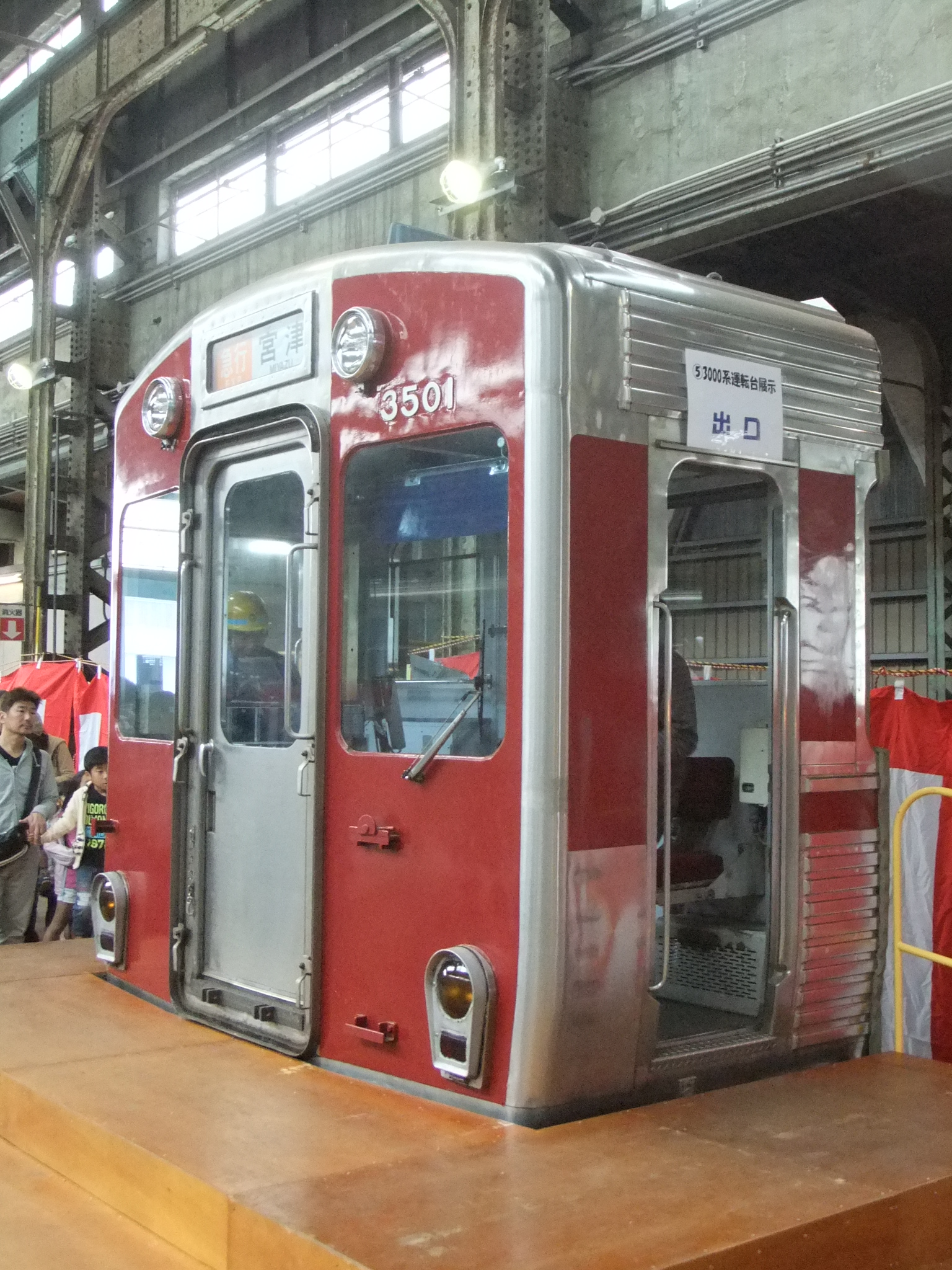 近鉄3501号 前頭部 きんてつ鉄道まつり2013 高安車庫一般公開時に撮影